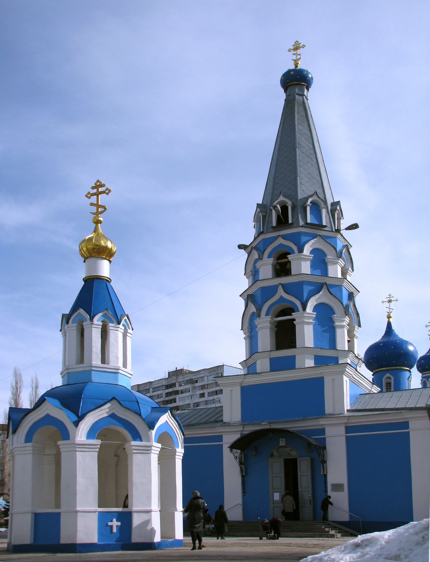 Церковь Успения Пресвятой Богородицы Церковь Успения слободы Монастырщенка